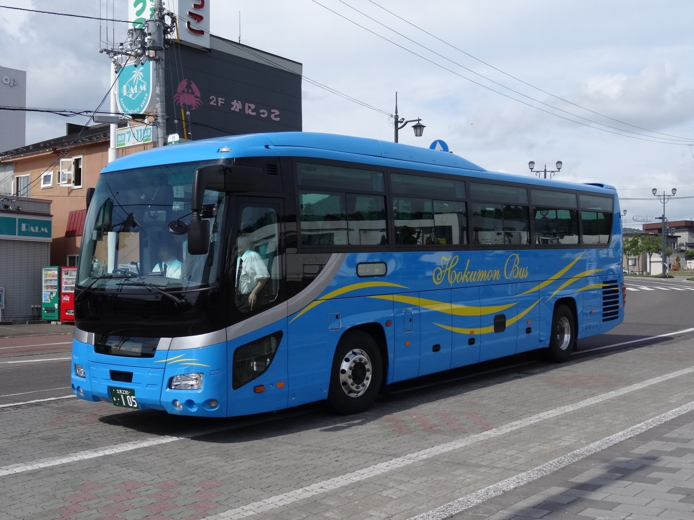 "Kōsoku Ryūhyō Monbetsu gō" Monbetsu to Sapporo